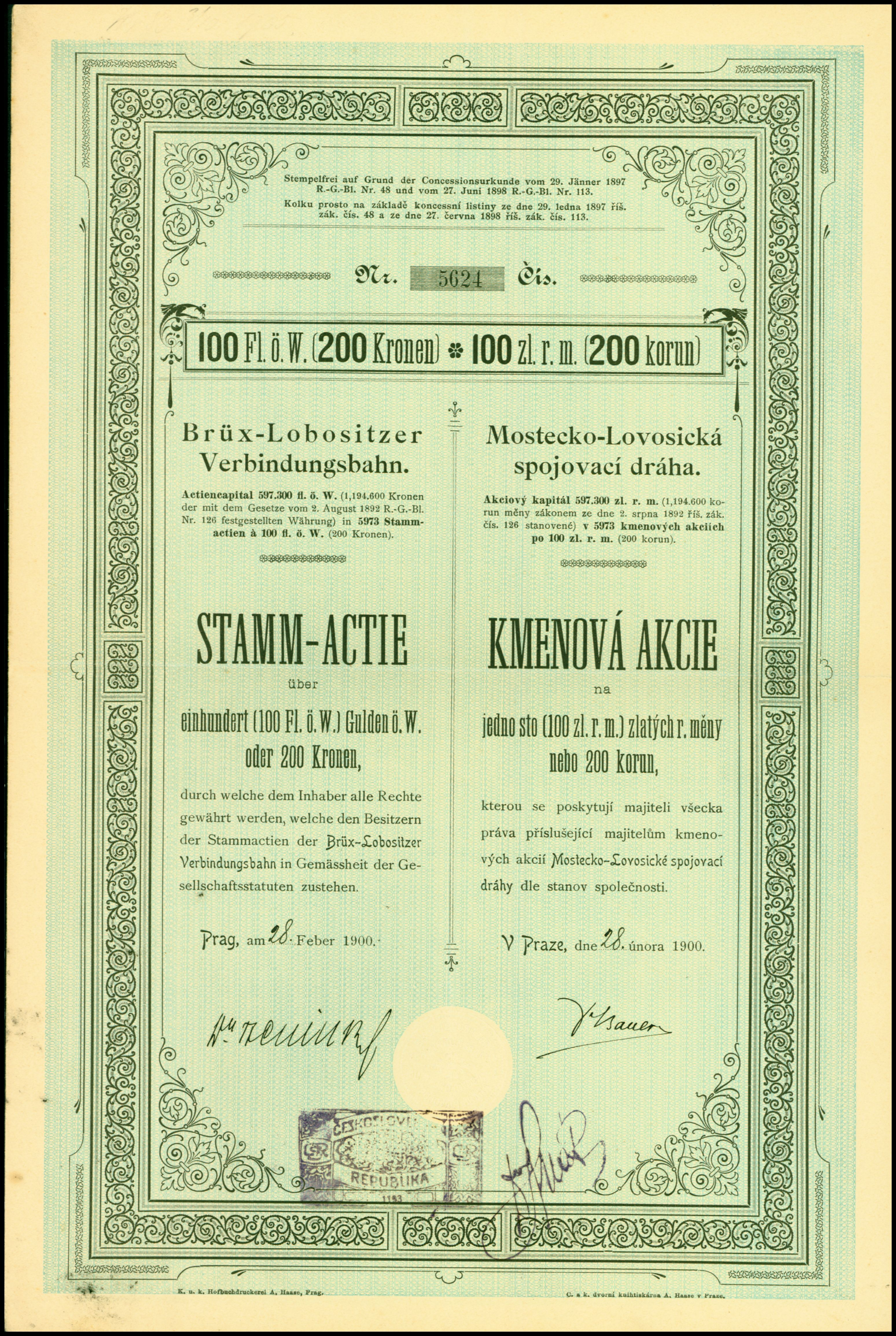 Stammaktie über 200 Kronen der Brüx-Lobositzer-Verbindungsbahn vom 28. Februar 1900, aus dem Fundus des Ersten Deutschen Historic-Actien-Museum e.V. (EDHAM), Kürnbach